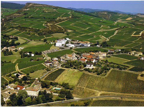 Davayé vue du ciel